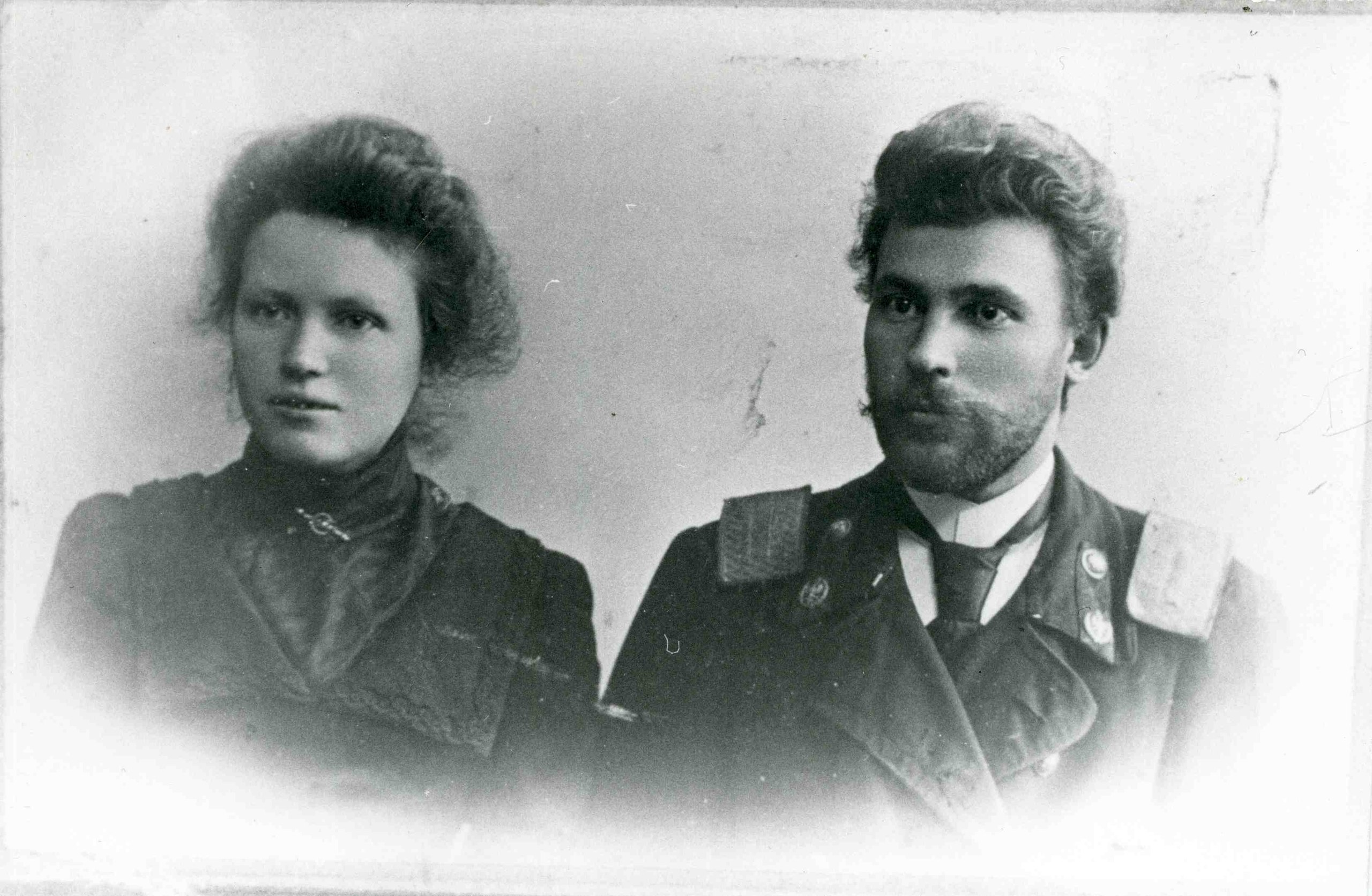 Иван Яковлевич и Алевтина Петровна Стяжкина, 1902